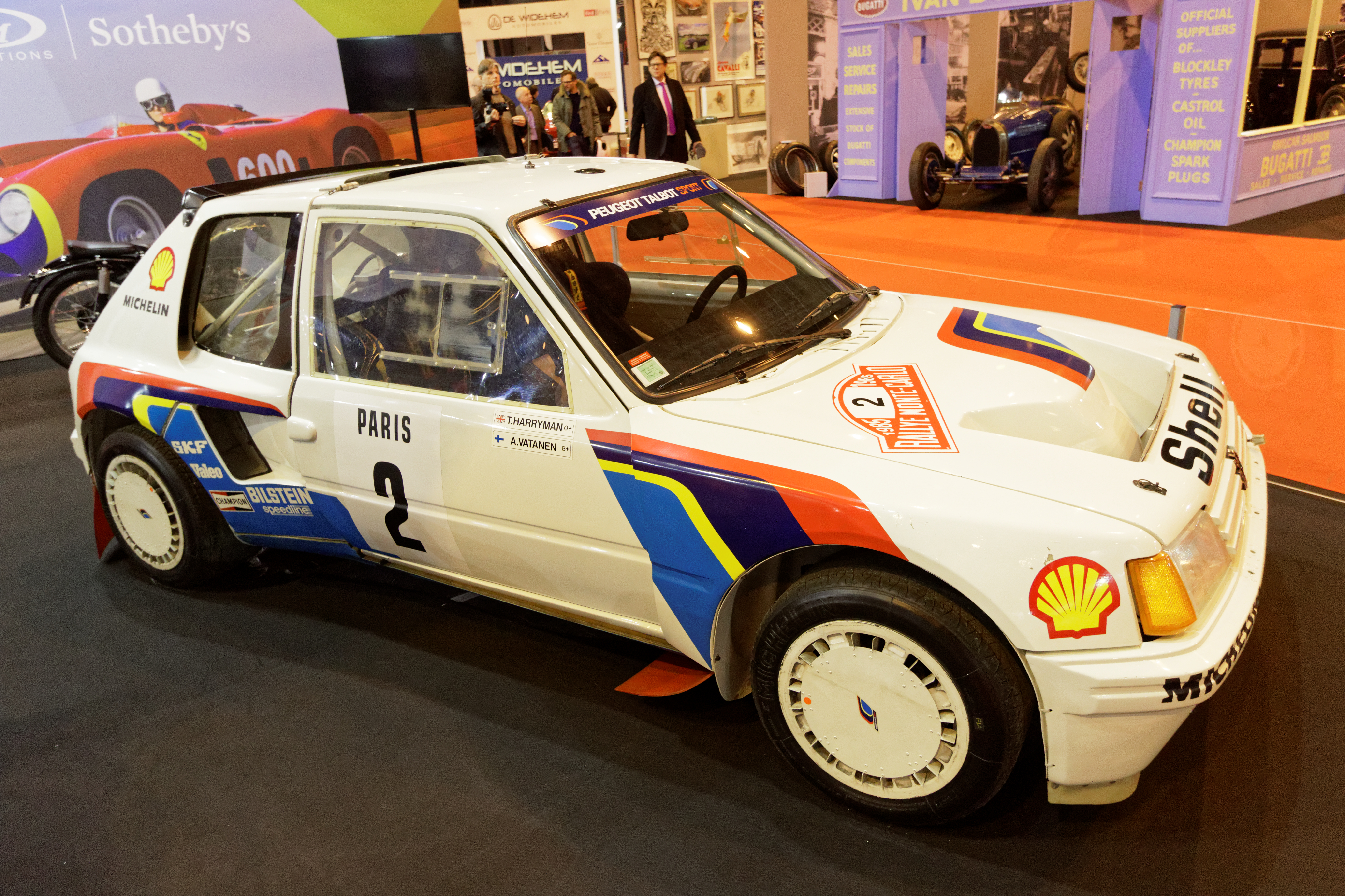 La Peugeot 205 Turbo 16 pilotée par Ari Vatanen lors du rallye de Monte Carlo 1985 exposée lors du salon Rétromobile 2016.